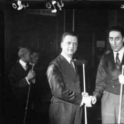 Edmond Soussa & Albert Corty-1930 bei der Cadre 47/2 WM 1930 in Antwerpen